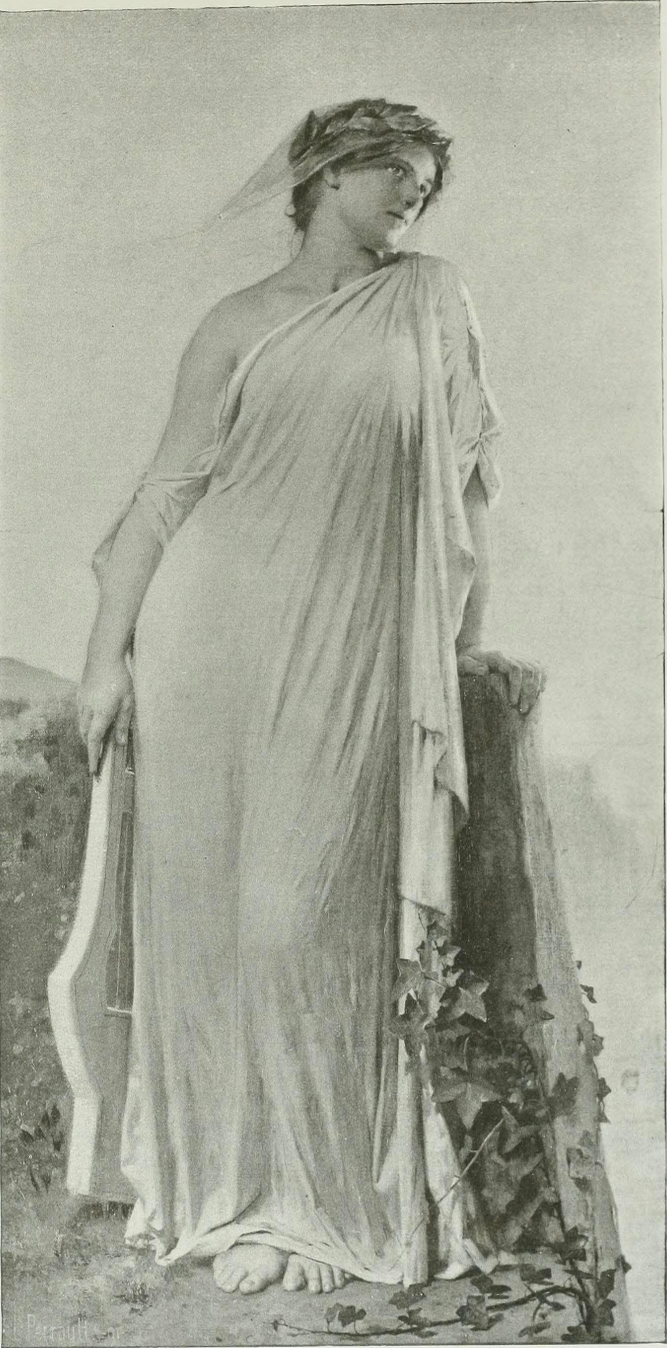 Sapho